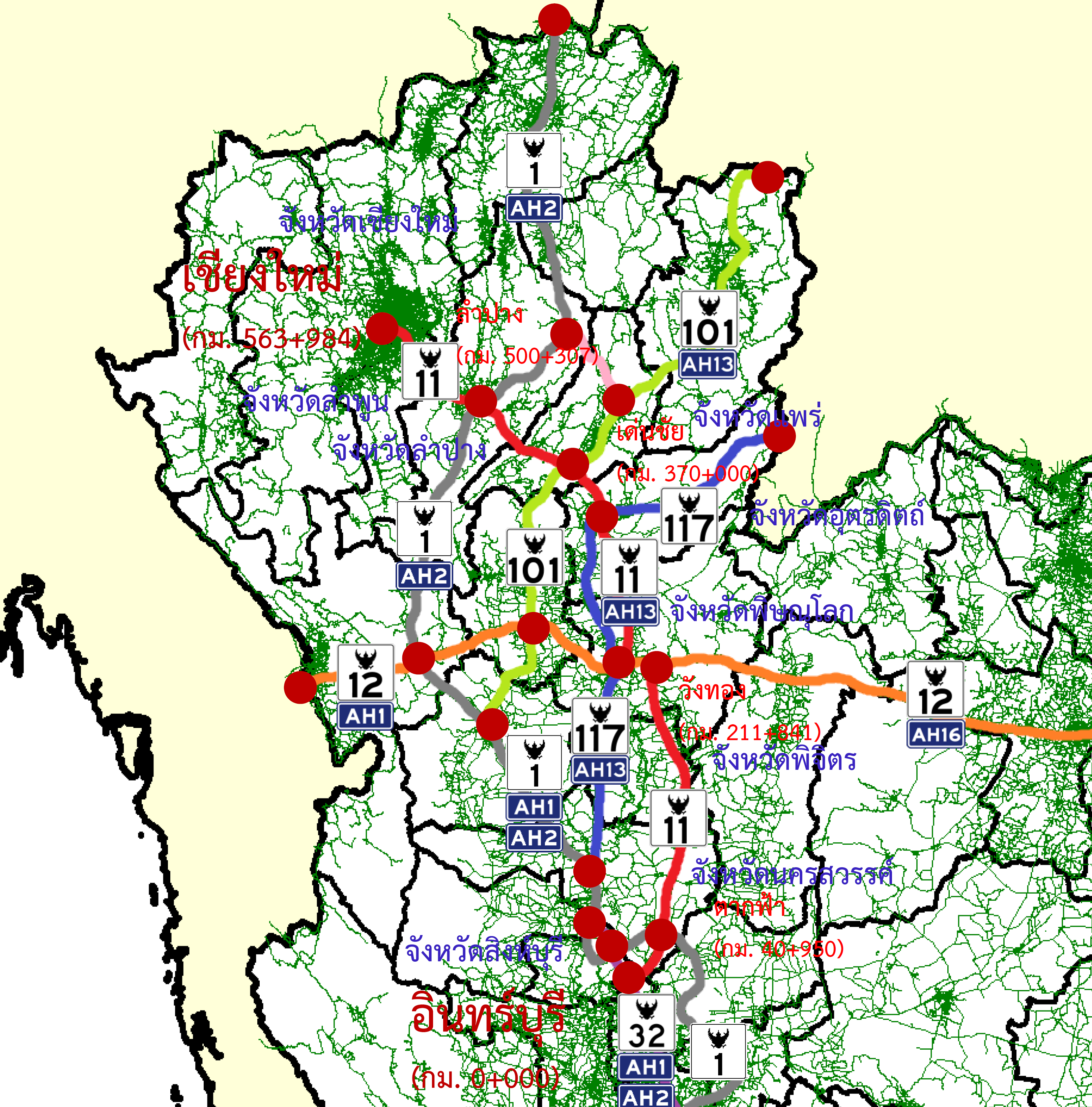 TH HW 11 MAP